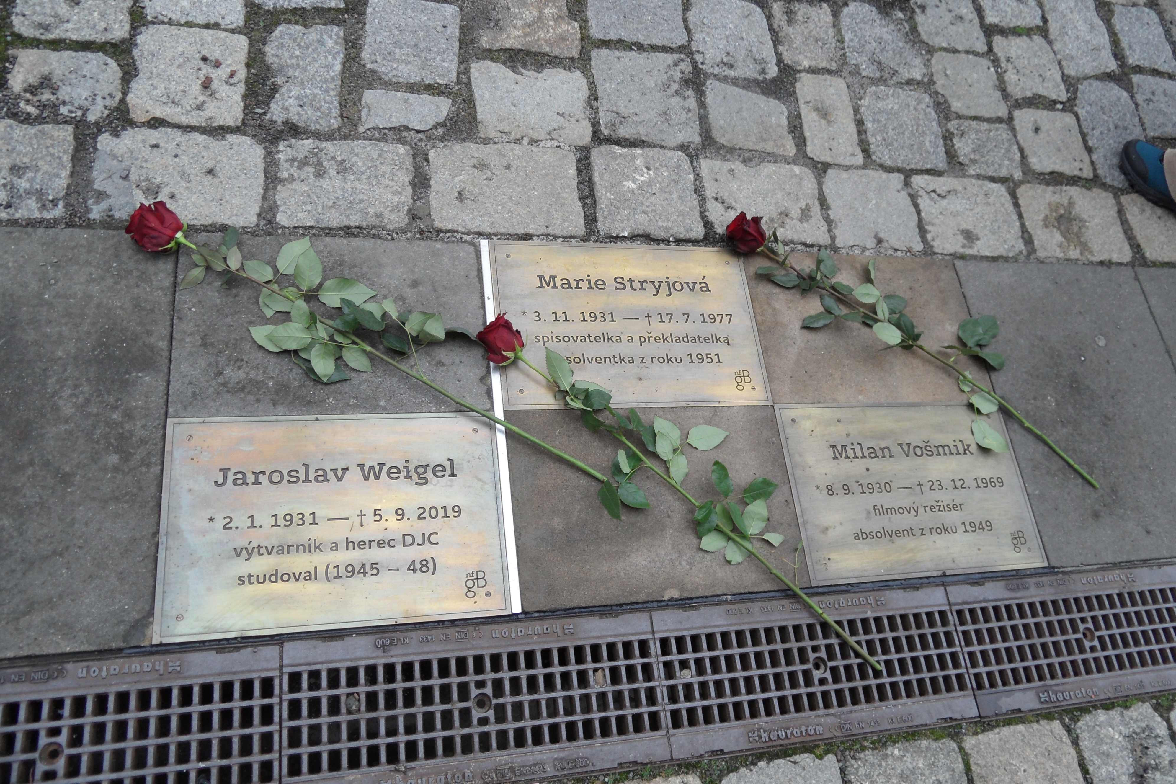 Pamětní desky slavných absolventů jsou pokládány od 20.6.2020